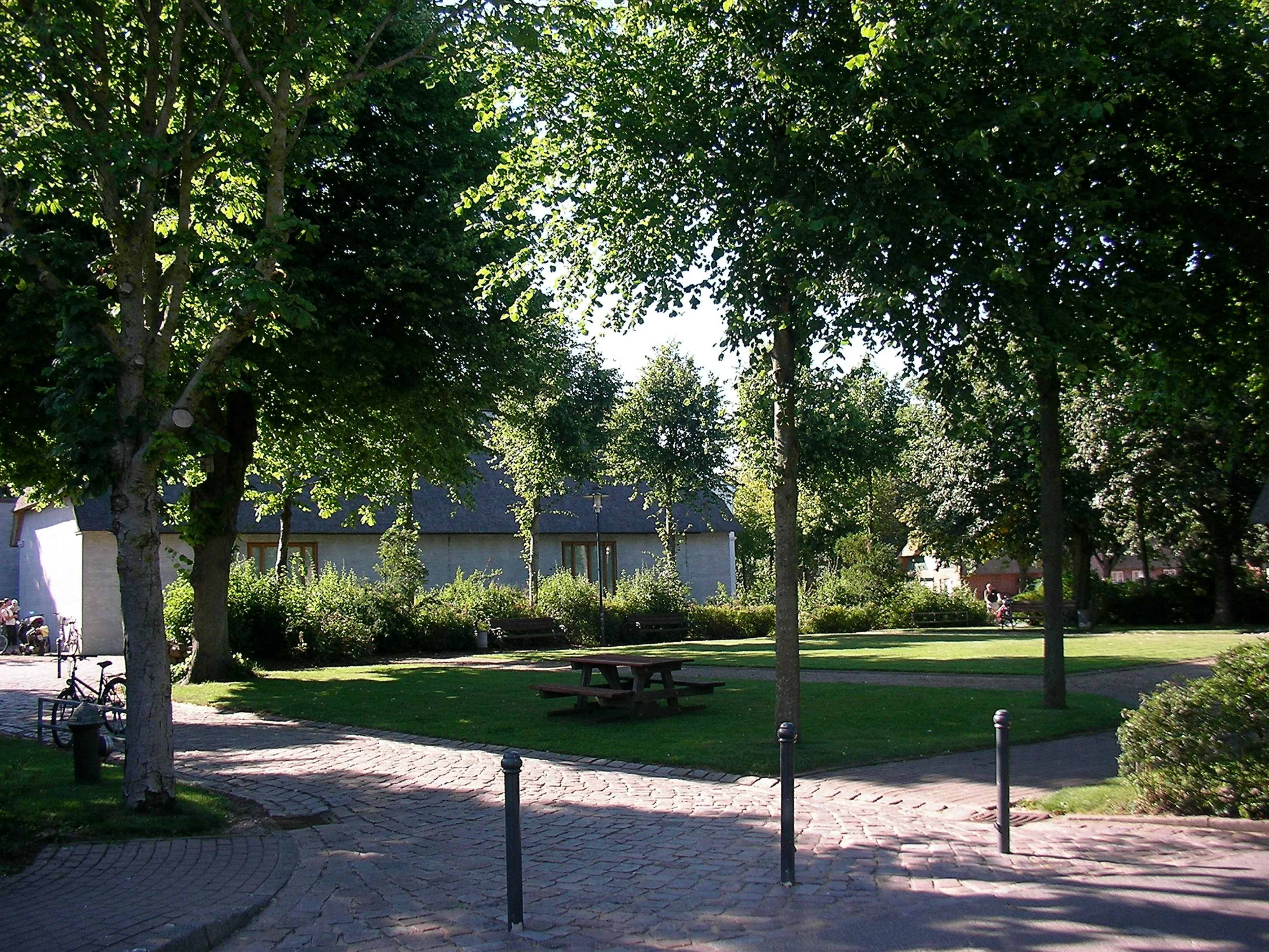 Alkersum